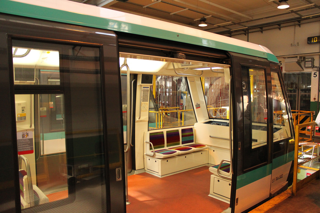 Un train MP 05 aux ateliers de Fontenay